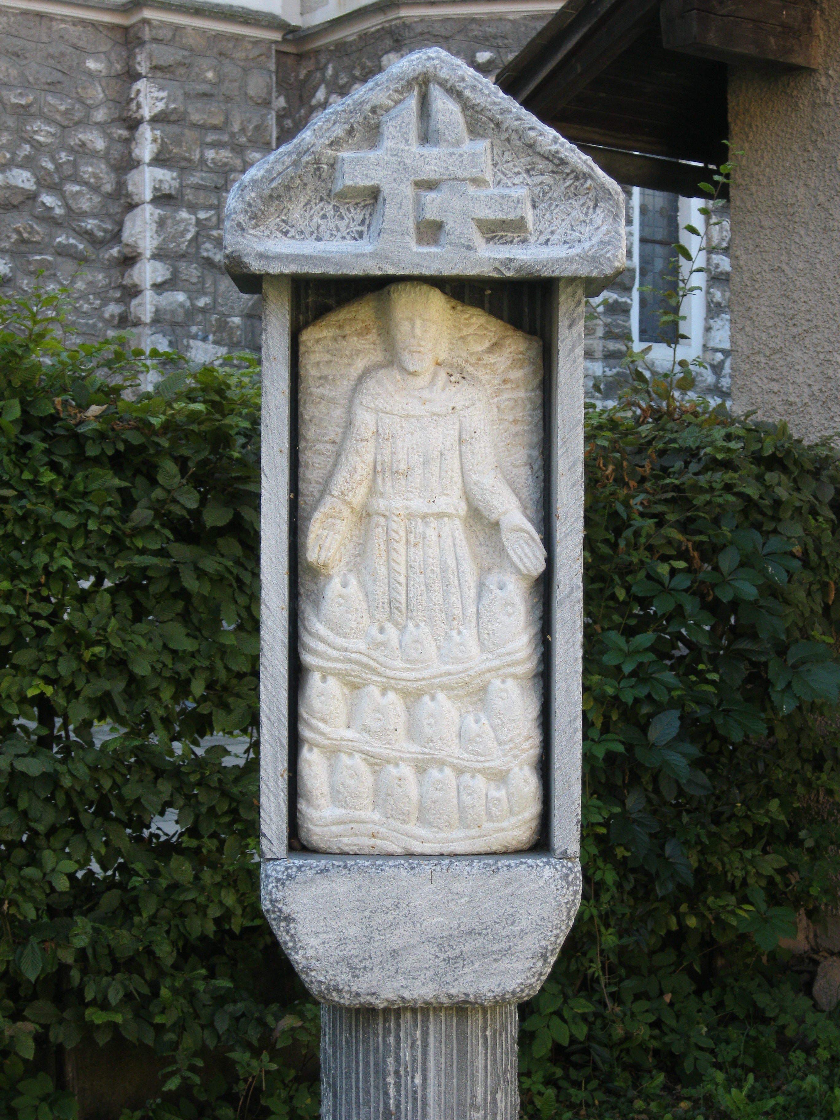 Antoniusbildstock von Alfred Schlosser (1988) im Pfarrhof hl. Veit Weißkirchen, Steiermark Dieses Foto wurde im Rahmen des von Wikimedia Österreich unterstützten Projekts Wiki takes oberes Murtal erstellt. The making of this work was supported by Wikimedia Austria. For other files made with the support of Wikimedia Austria, please see the category Supported by Wikimedia Österreich. Object location47° 09′ 16.98″ N, 14° 44′ 18.07″ E